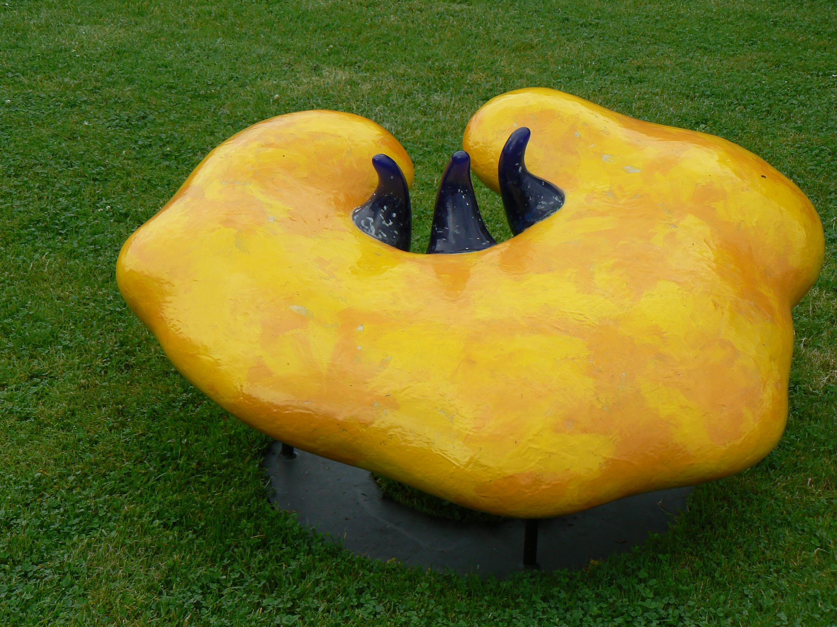 sculpture in Funnix, Germany